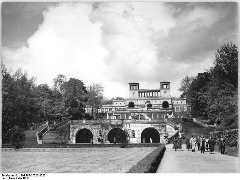 Zentralbild Klein 25.5.1955 Aufnahme Mai 1955 Potsdam - Sanssouci Im Park von Sanssouci: Die Orangerie mit Terrassen und Wasserspielen.